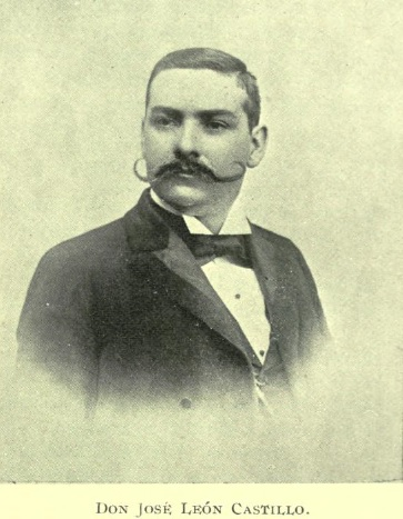 José León Castillo en 1897. Político guatemalteco que se opuso férreamente al gobierno del licenciado Manuel Estrada Cabrera.